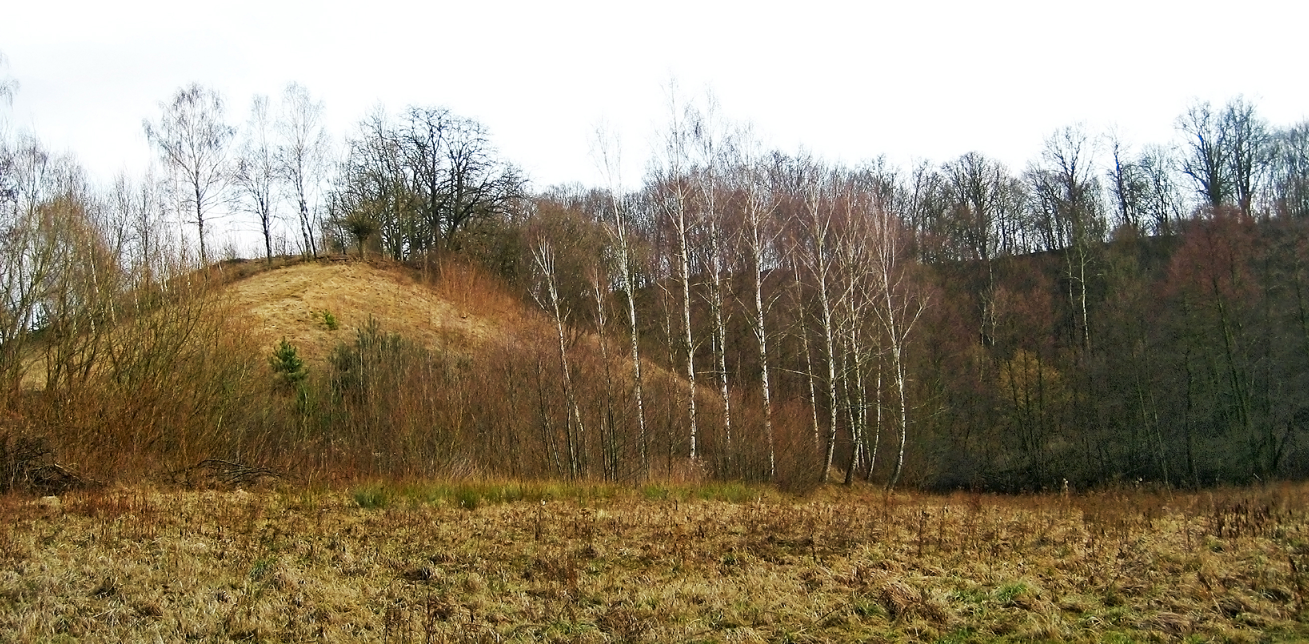 Wczesnośredniowieczne grodzisko w Szeligach na Mazowszu